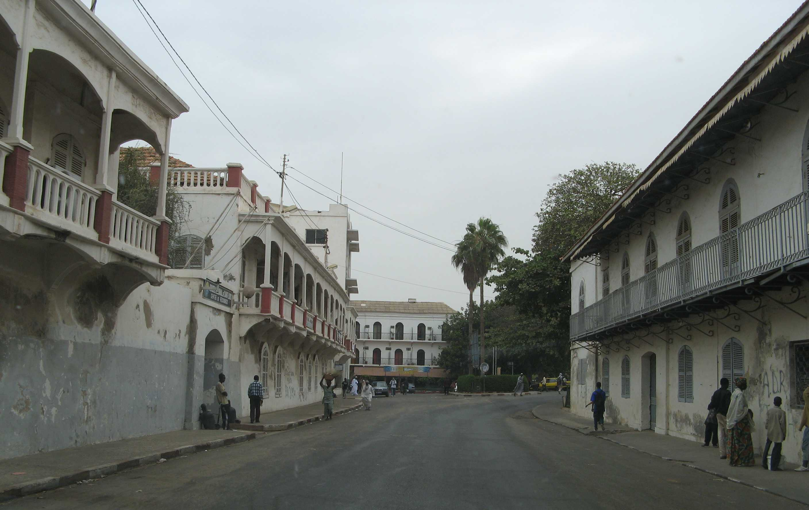 Colonial houses in Saint-Louis du Sénégal